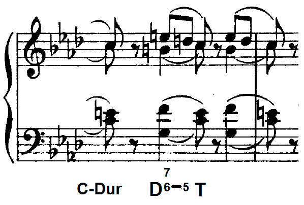 reguläre Behandlung eines dominantischen Sextvorhalt bei Adolph Jensen (Wanderbilder)